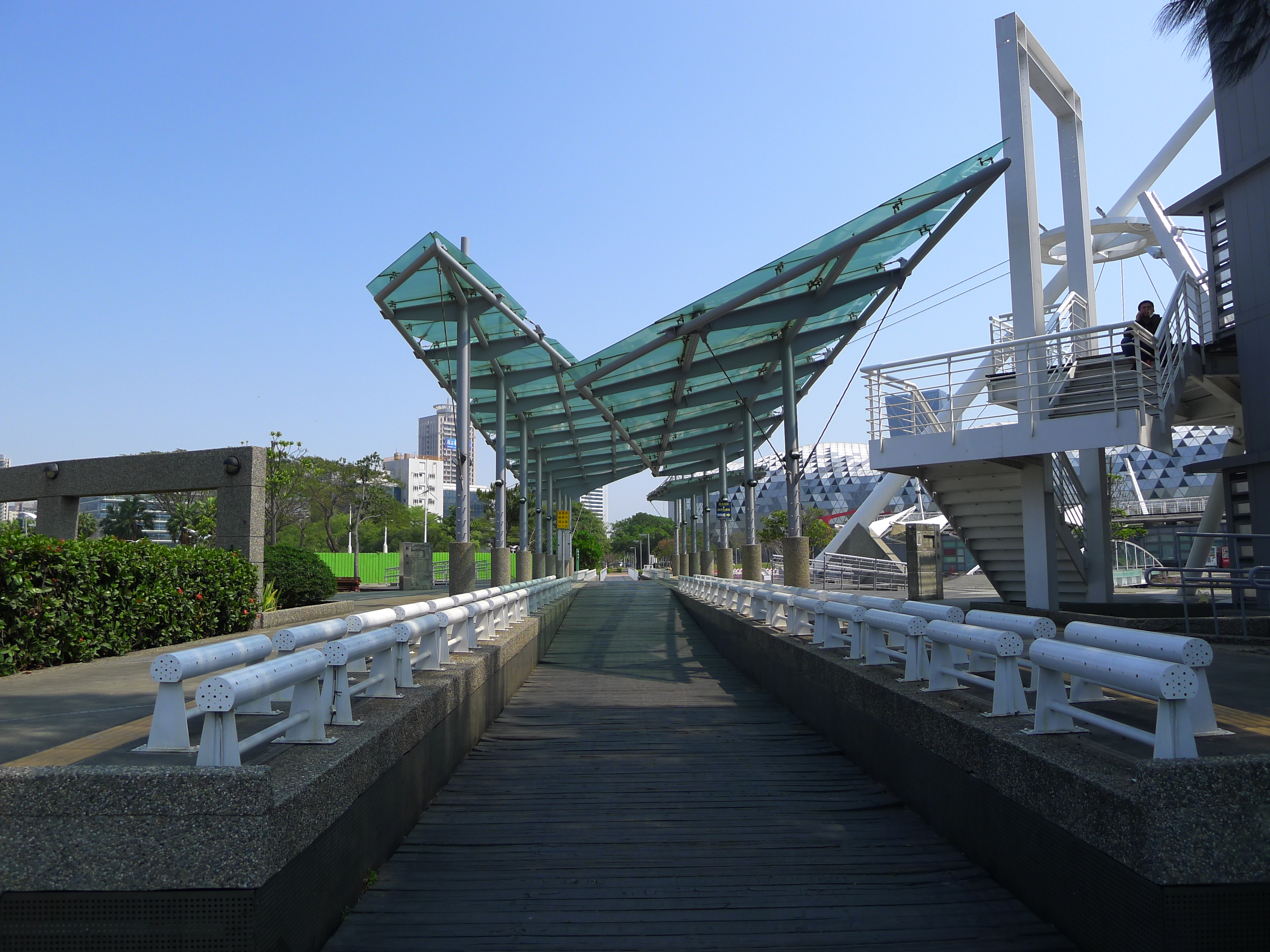 中文（台灣）: 高雄臨港線新光車站